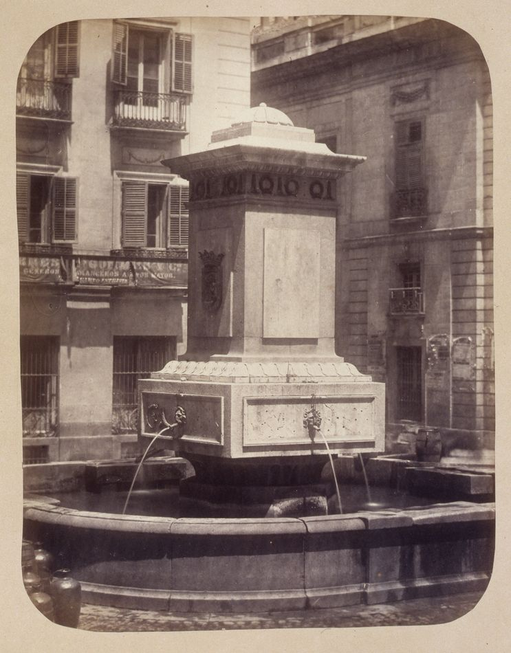 Antigua fuente de la Plaza de Pontejos. Obra en 1864 del fotógrafo toledano Alfonso Begué, muerto el 31 de octubre de 1865. Cartulina sepia. Albúmina. 43 x 32 cm. Fotografía contenida en un álbum procedente del Archivo de Villa y trasladado al Museo de Historia en 1983.